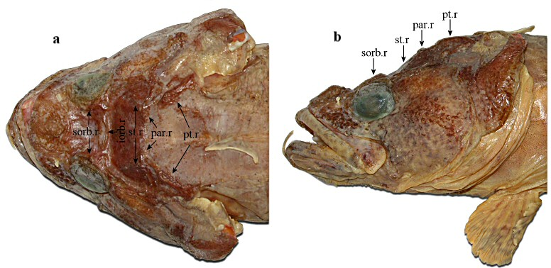 Pogonophryne scotti: head, dorsal and lateral view (formalin)